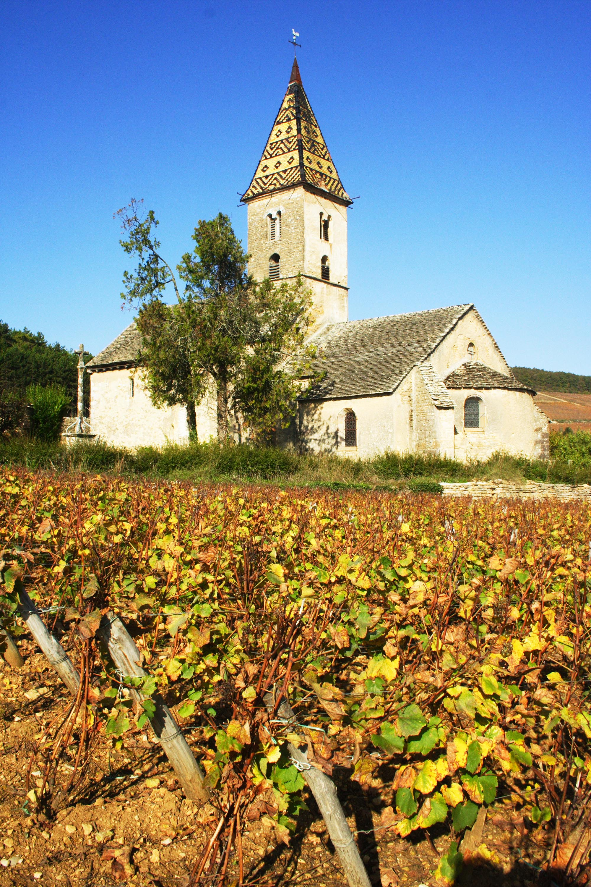 Fixey (Côte-d'Or), église romane